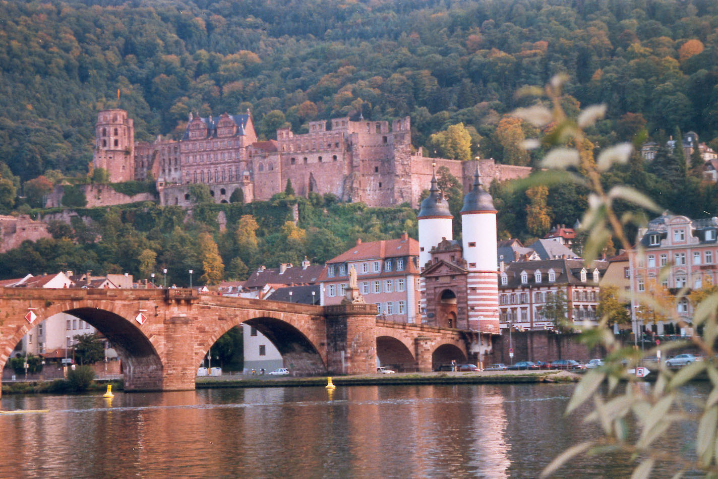 Heidelberger Schloss und Alte Brücke vom Neckarufer